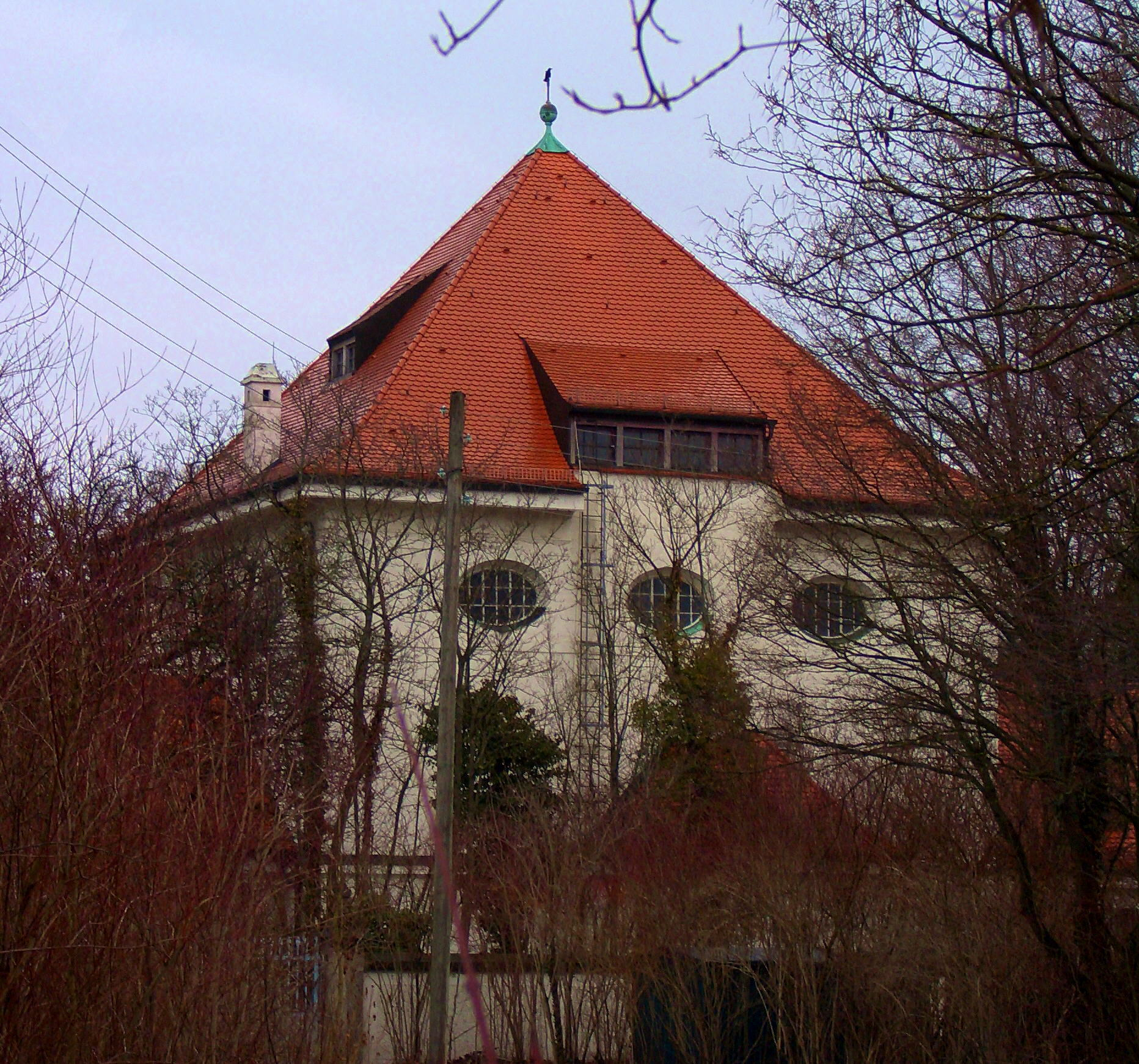 Neuer Israelitischer Friedhof München von Süden